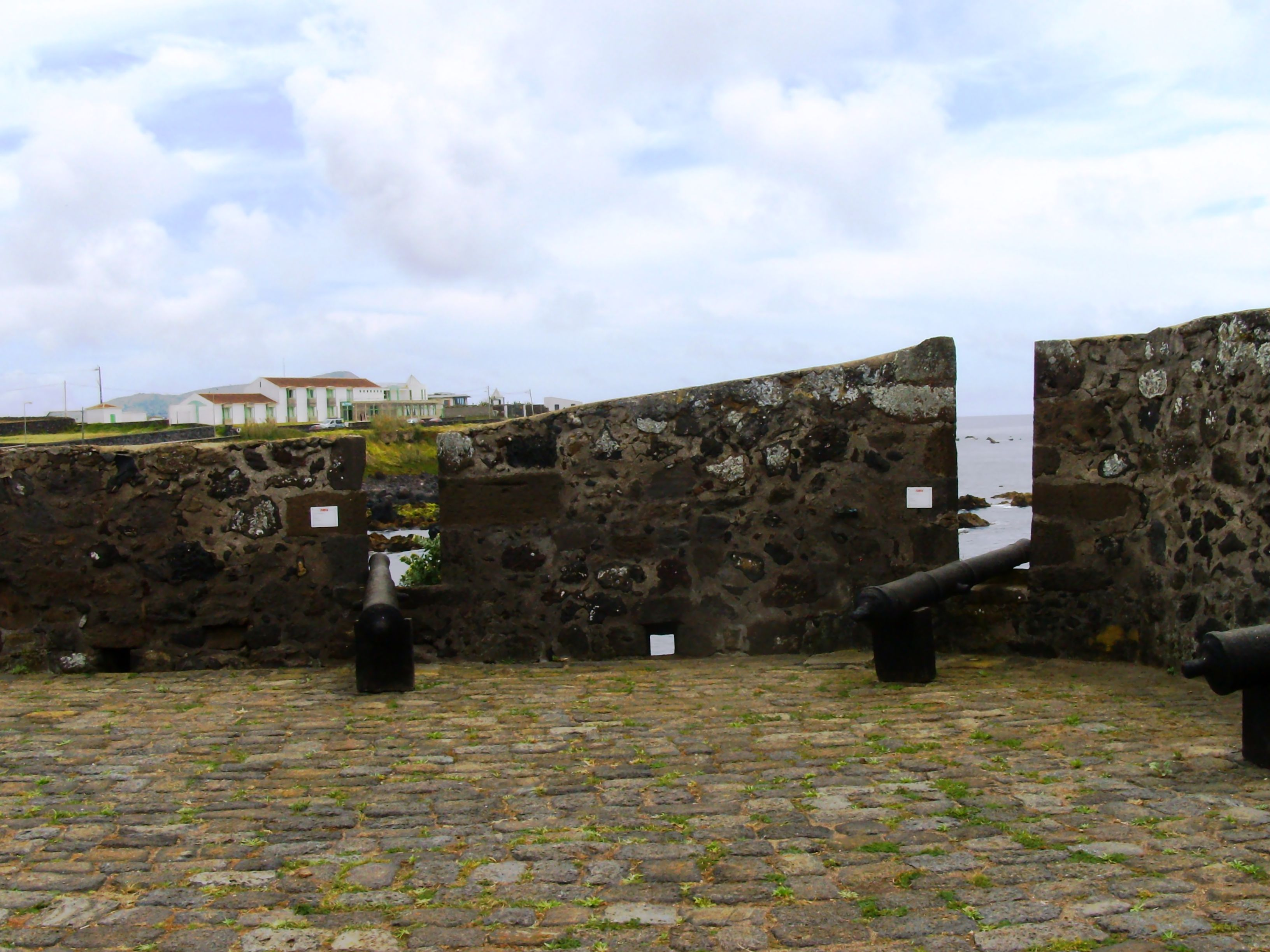 Forte do Negrito, São Mateus da Calheta, Angra do Heroísmo, Ilha Terceira, Açoires: artilharia